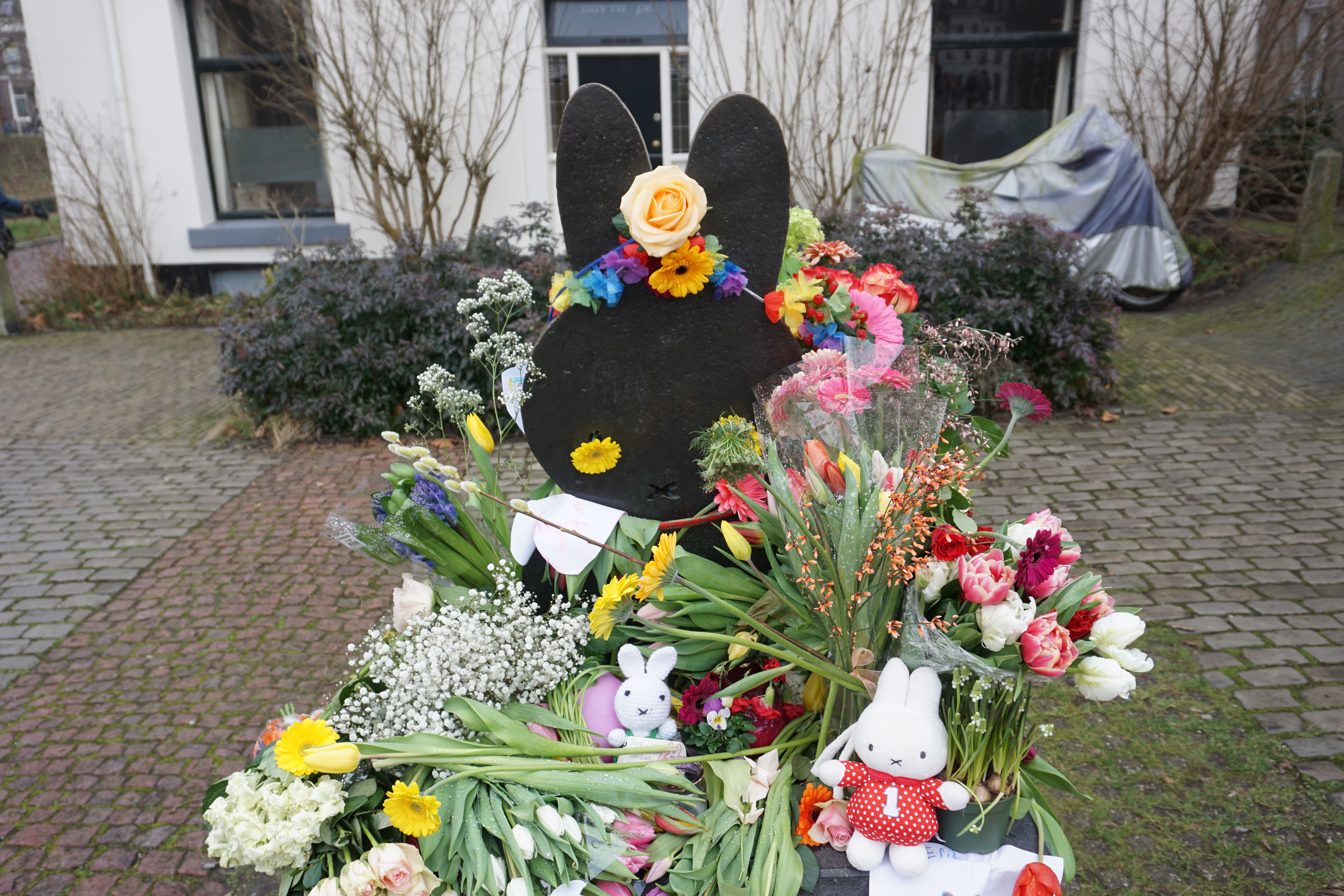 Bloemen op het Nijntjeplen